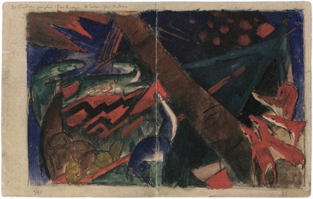 Franz Marc: Die Bäume zeigten ihre Ringe, die Tiere ihre Adern, Aquarell auf Papier, 16.4 x 16 cm, Bayerische Staatsgemäldesammlungen München